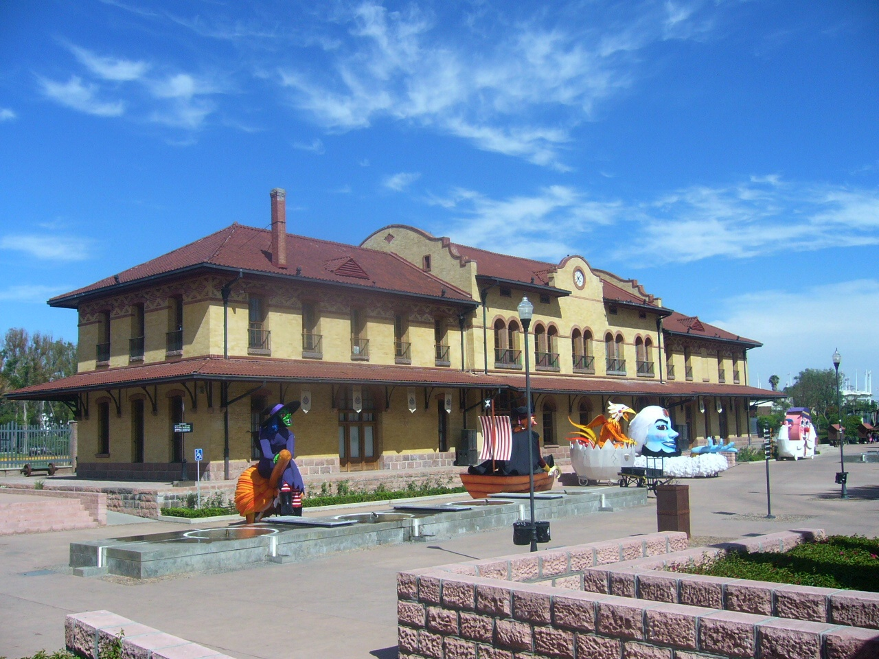 Complejo Ferrocarrilero Tres Centurias, Aguascalientes, Aguascalientes, México.